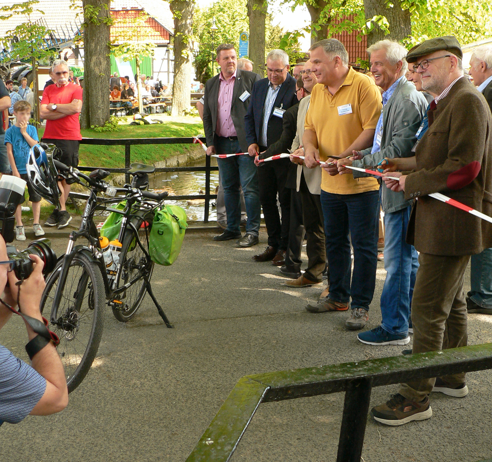 Eröffnung des Schunter-Radwegs auf einer Brücke über die Schunter in der Ortsmitte von Räbke